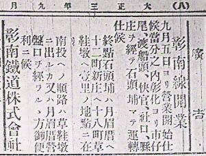 大正三年（1914年）九月彰南鐵道株式會社彰南線開業廣告